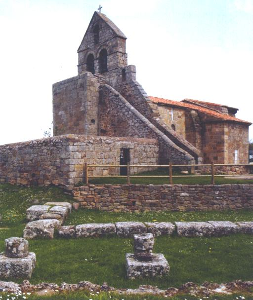 Iglesia de Santa María de Retortillo (Retortillo). Se trata de una iglesia románica del siglo XII.